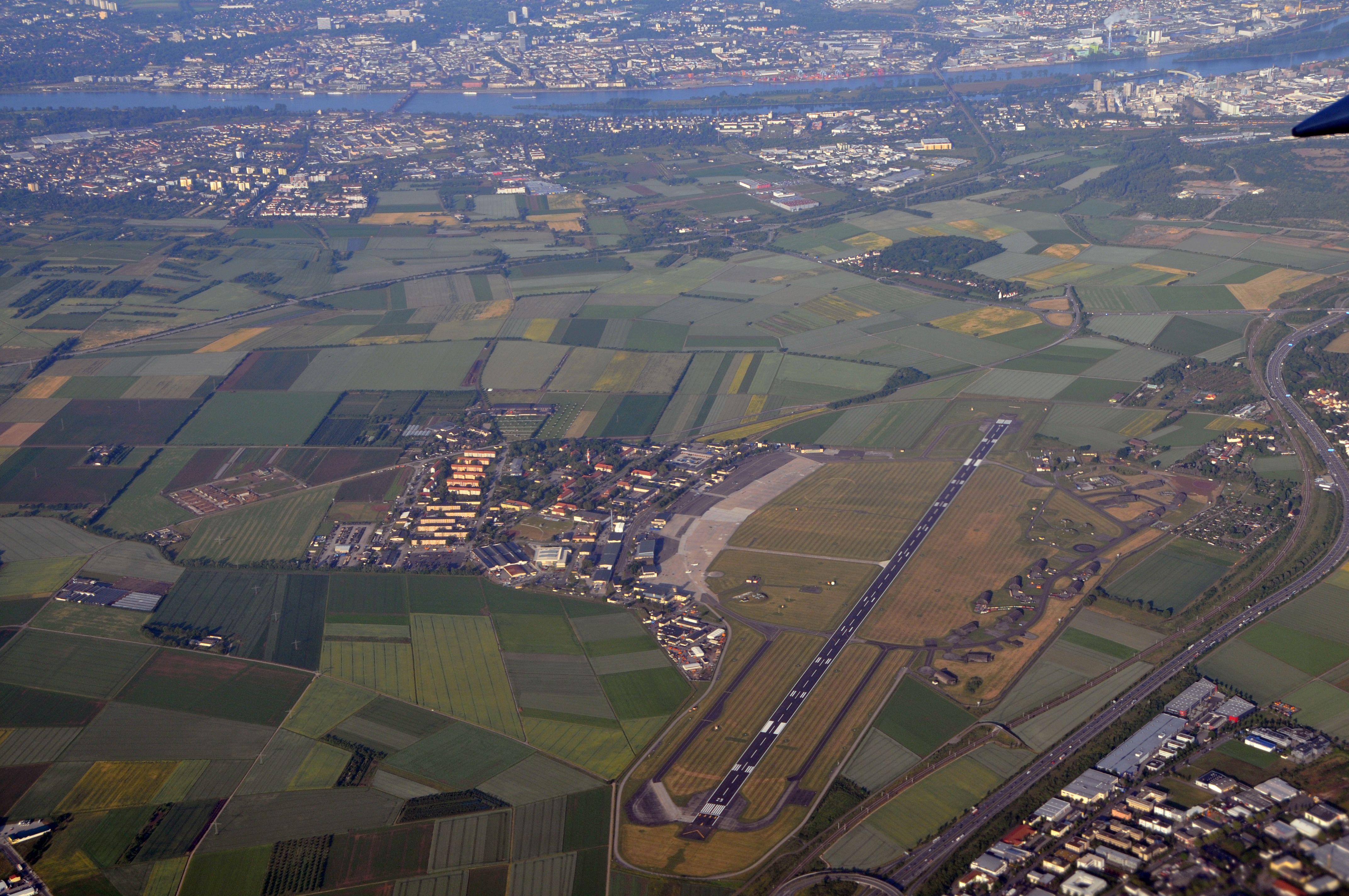 Vue aérienne de l'aéroport militaire de Erbenheim. En haut de l'image, on voit passer le fleuve le Rhin et la ville de Mayence.